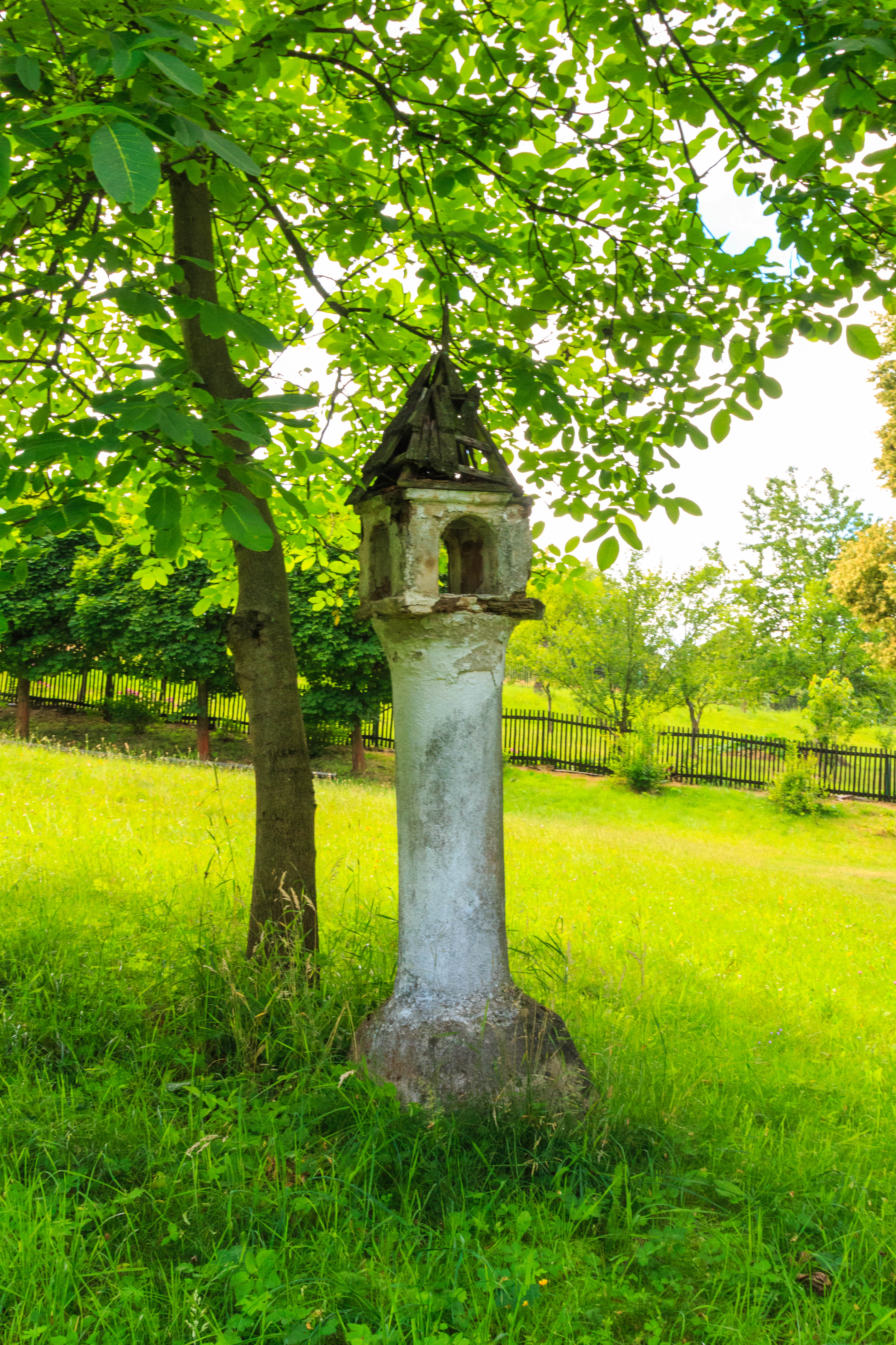 Dvorecko boží muka